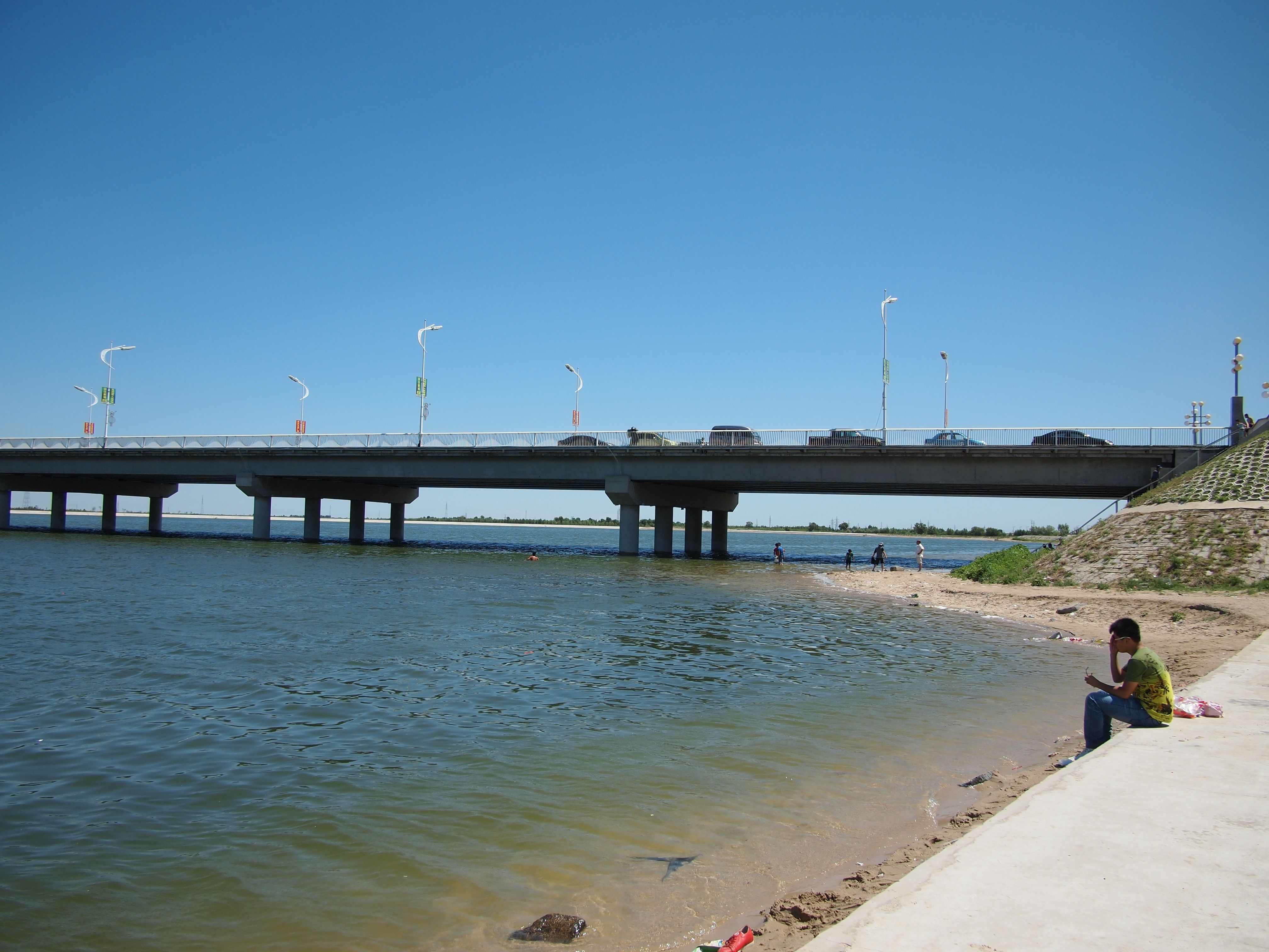 哲里木大桥 - Zhelimu Bridge - 2011.07